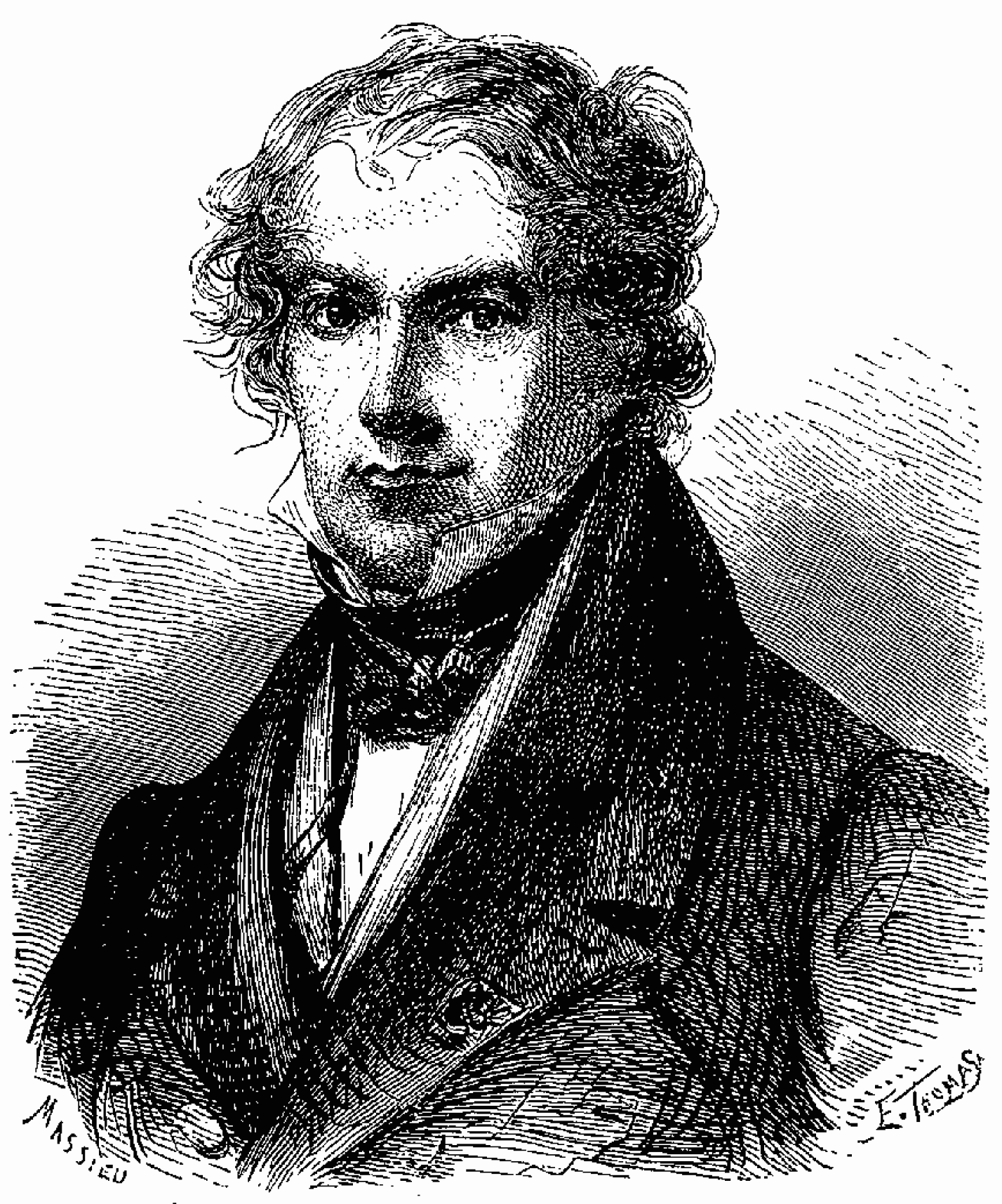 J. B. Biot